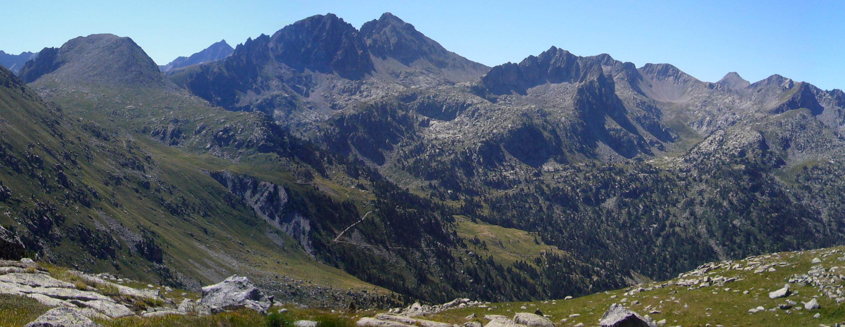 Vall de Peixerani vist des de Colomers d'Espot; Espot, Pallars Sobirà, Catalunya